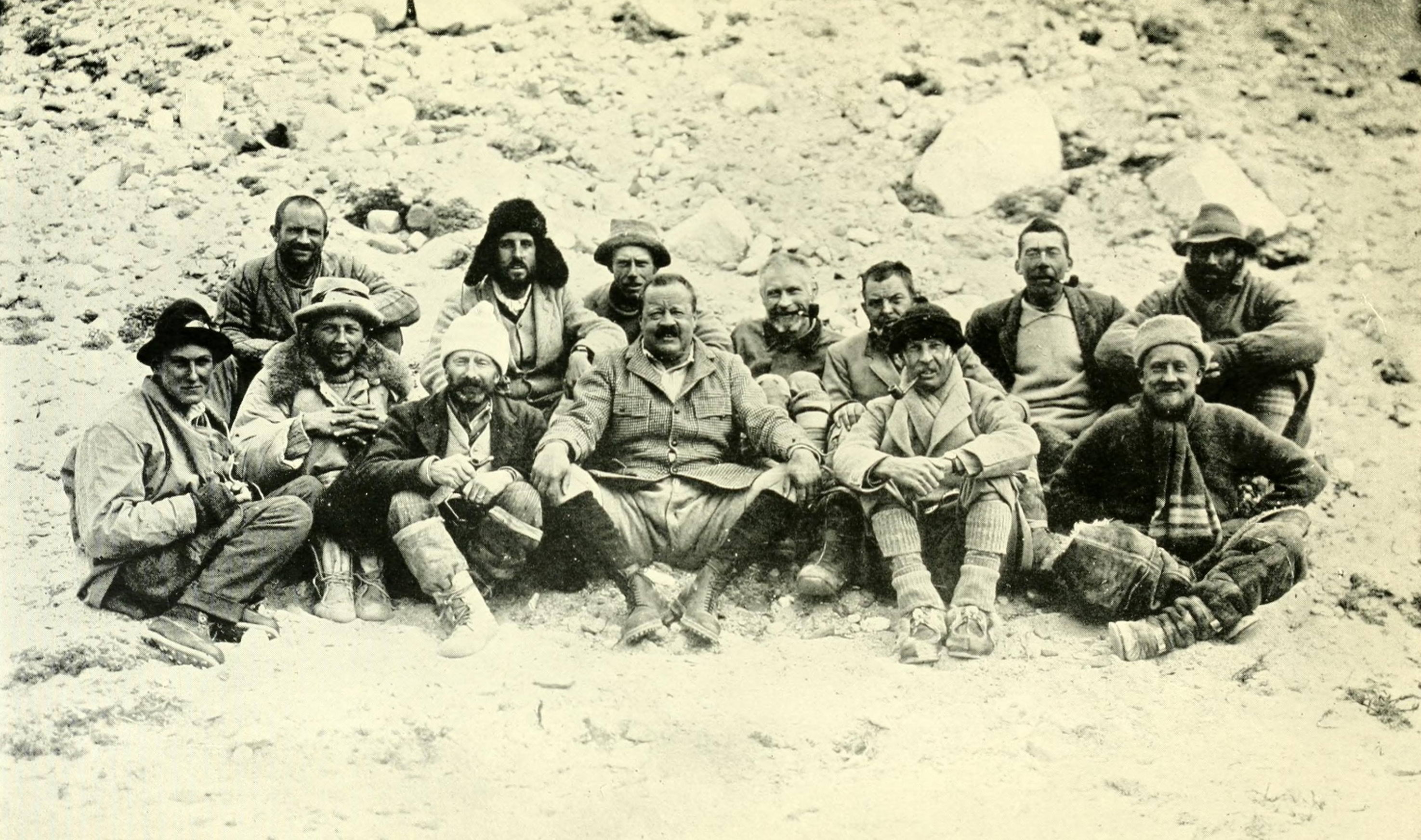 Участники Британской экспедиции на Джомолунгму 1922 года в базовом лагере